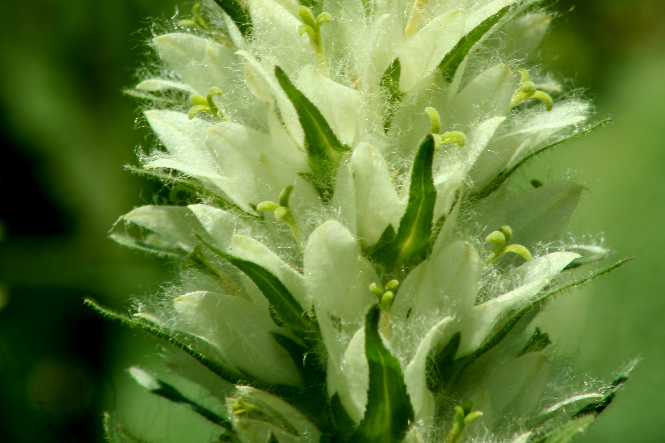 Campanula thyrsoides subsp carniolica "Giardino Botanico delle Alpi Orientali", Monte Faverghera (BL), 1500 m s.l.m.